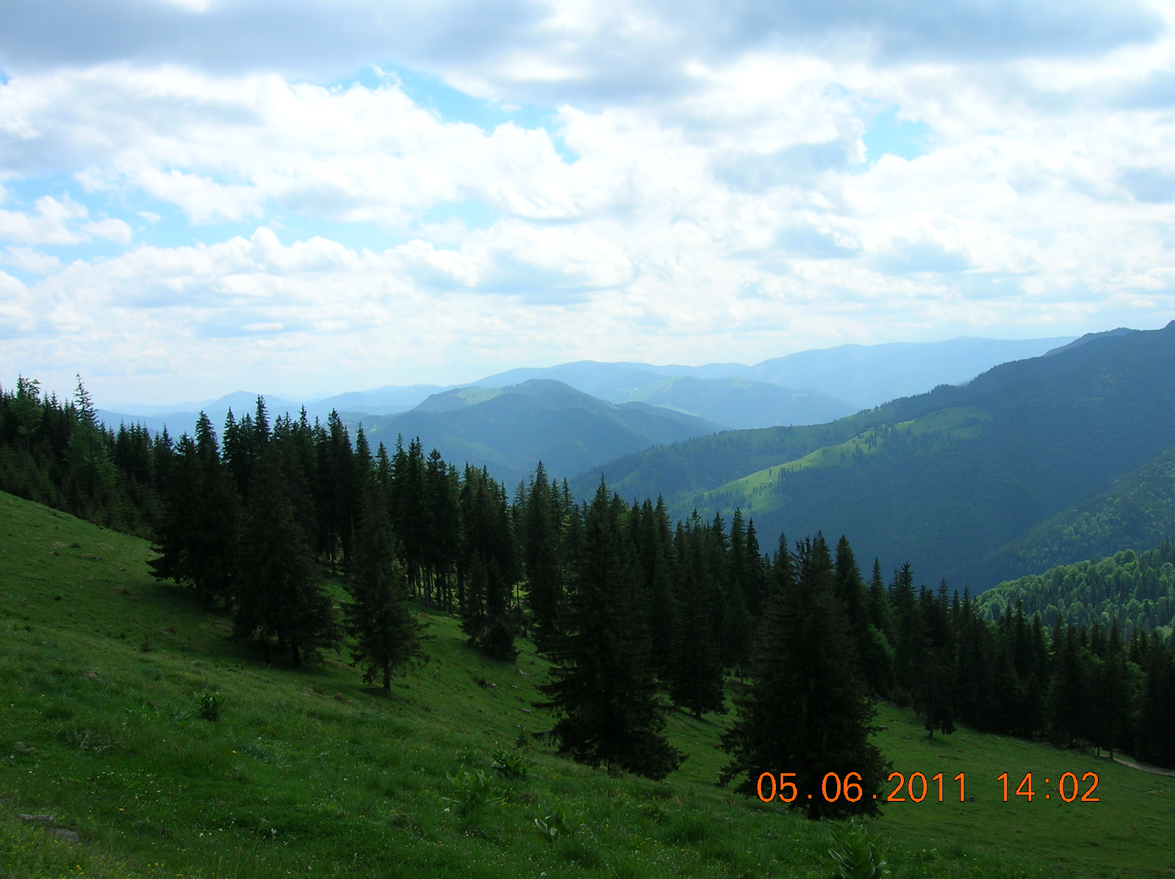 Munţii Stânişoarei (Carpaţii Orientali, România)-De lângă Crucea talienilor cu obiectivul spre Valea Bistriţei